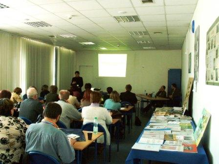 WSTH w Łodzi warsztaty turystyczne dla nauczycieli